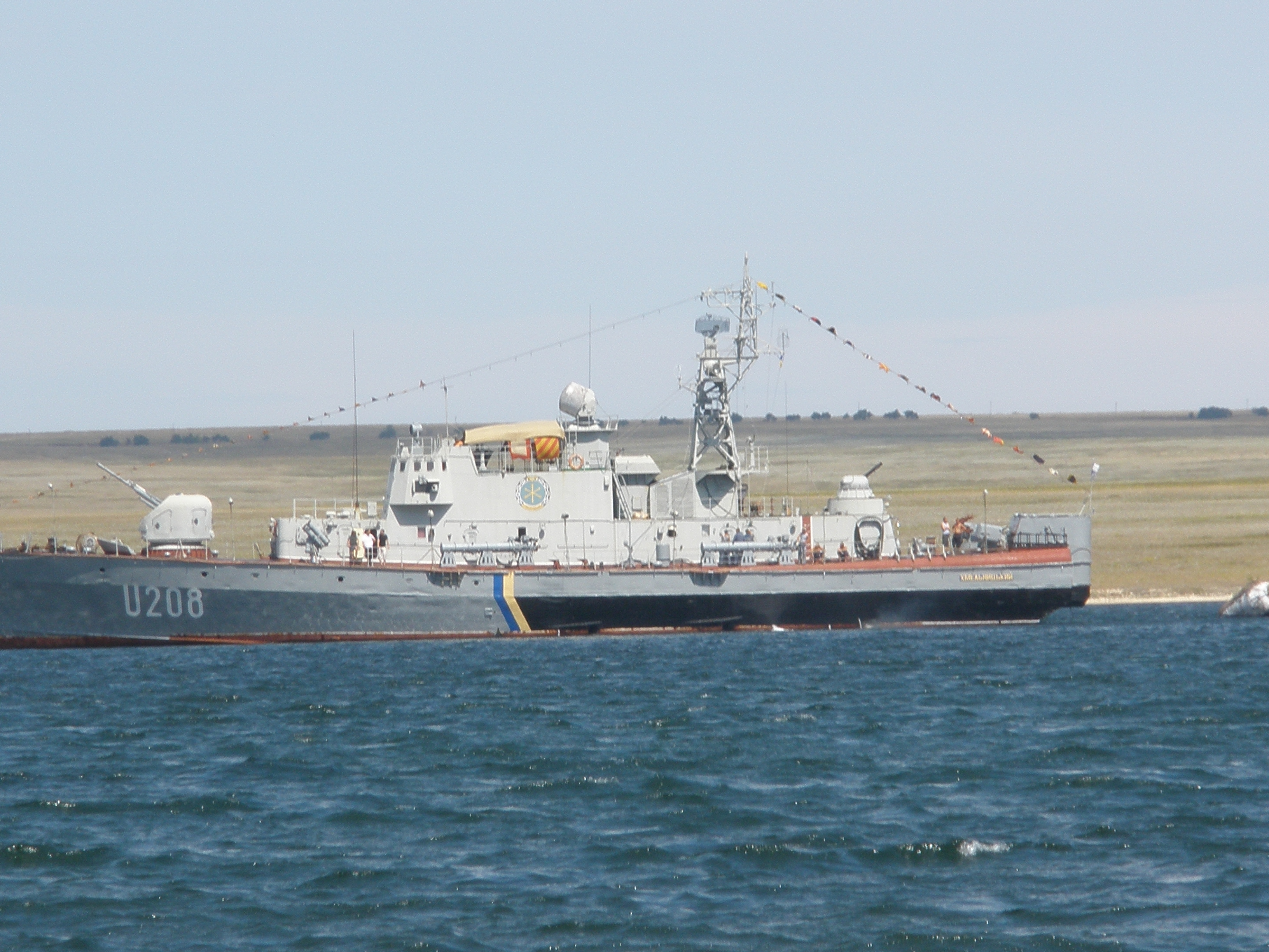 Хмельницкий (U208)